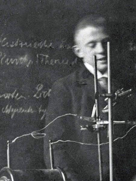 Werner Heisenberg habilitiert sich, Göttingen im Juli 1924. Das Foto nahm mein Vater 1924 in Göttingen auf.